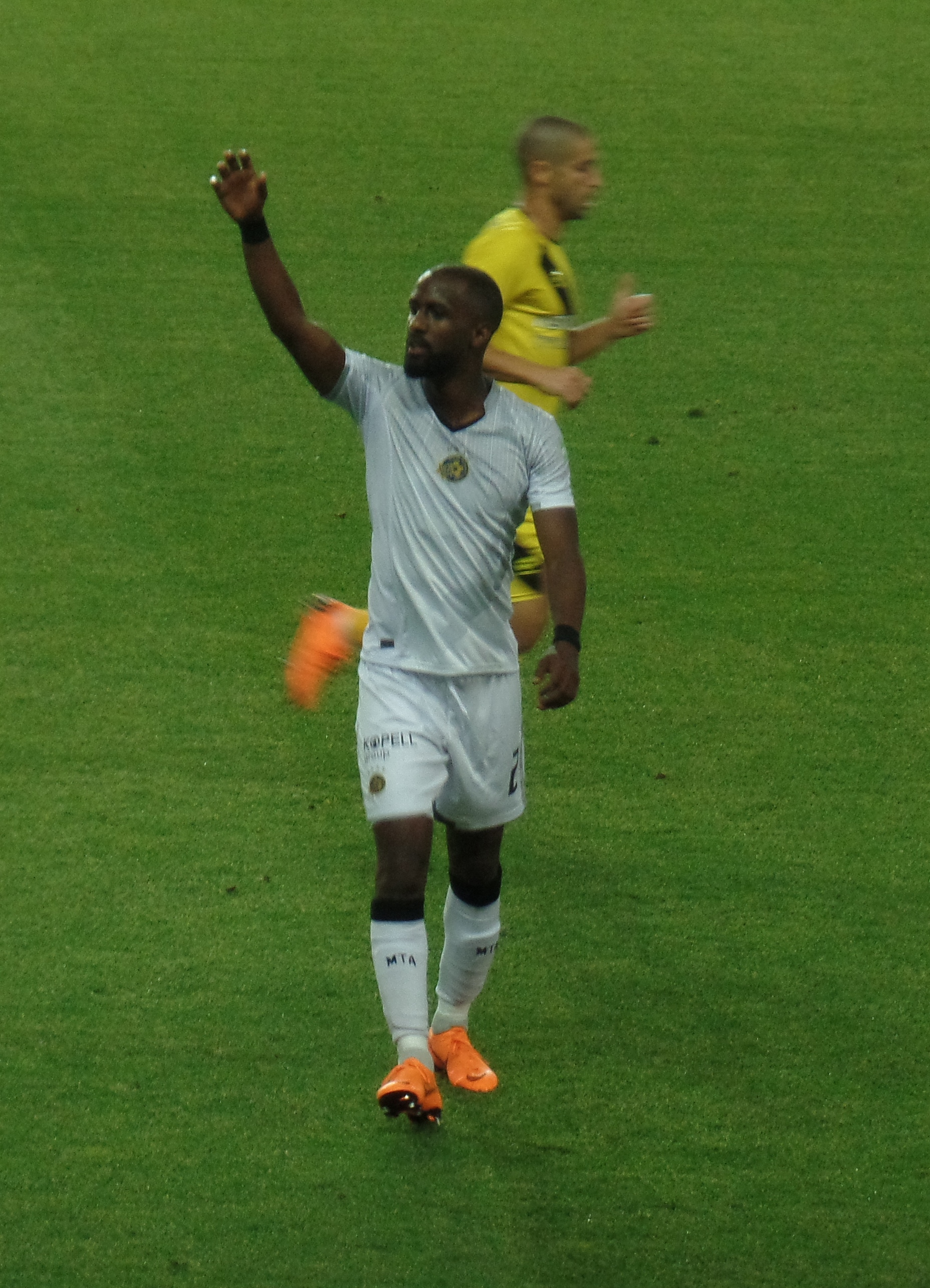 אלי דסה במדי מכבי ת"א